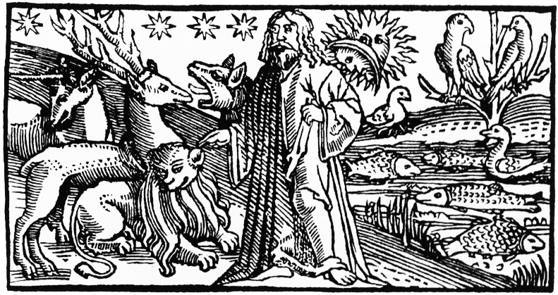 Францыск Скарына. "Бог у раі". Первыя книги Моисеовы рекомыя Бытия (Кніга Быццё). Прага, 1519. Л. 9, гравюрная застаўка. 54Х105 мм.